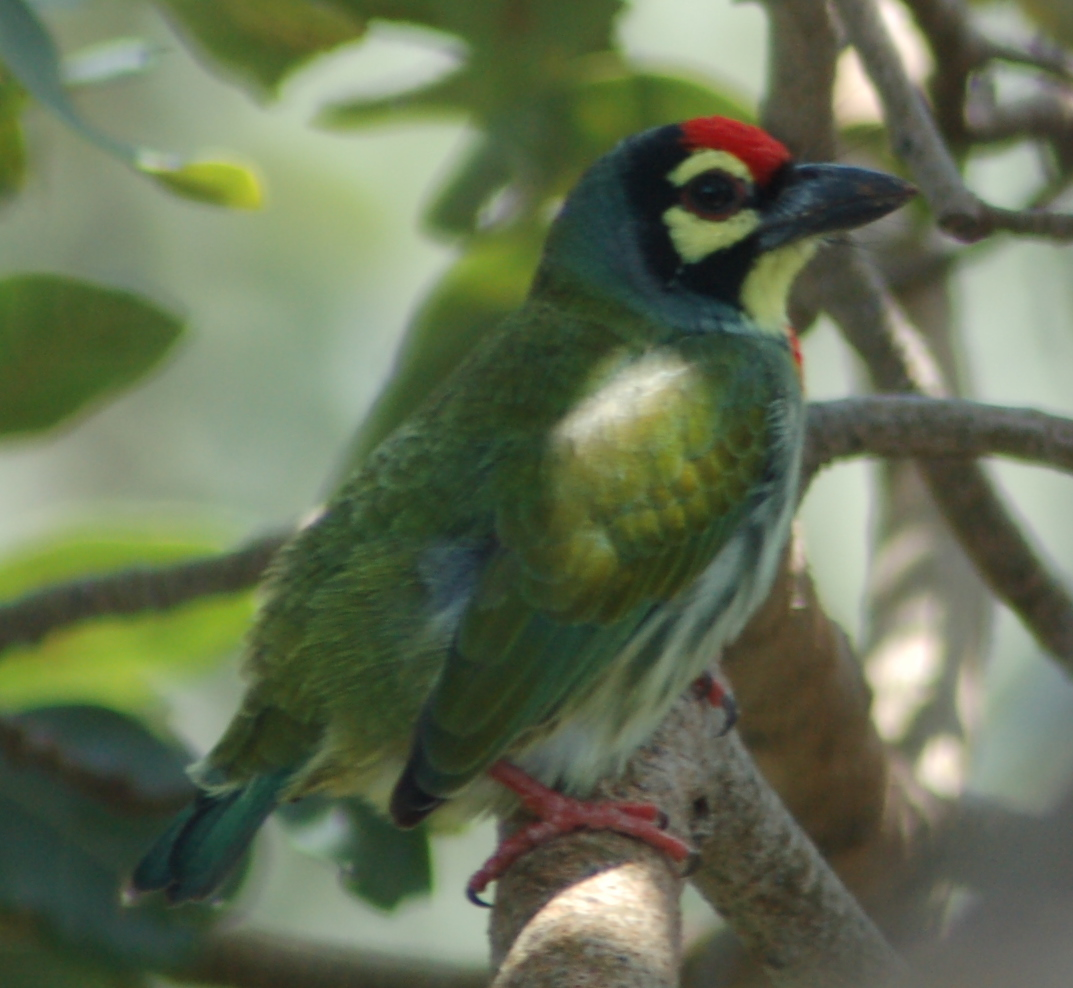 Coppersmith Barbet Megalaima haemacephala